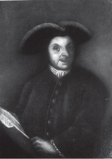 Nikolaus Beuttner (* vor 1592 in Gerolzhofen; † nach 1610 in Sankt Lorenzen im Mürztal) war ein deutscher Lehrer und Kirchendiener, der als Herausgeber eines katholischen Gesangbuchs Bekanntheit erlangte.